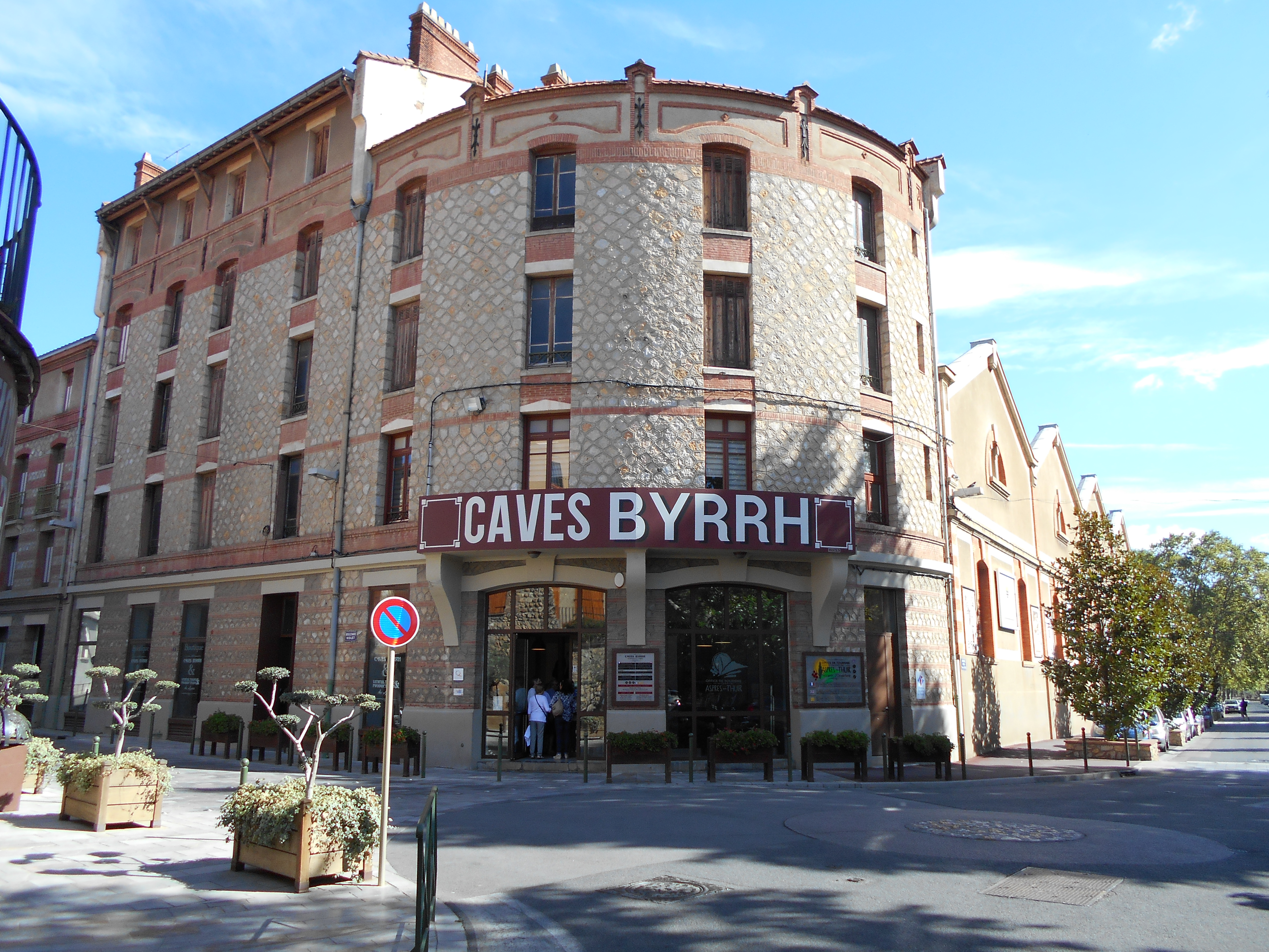 Les caves Byrr